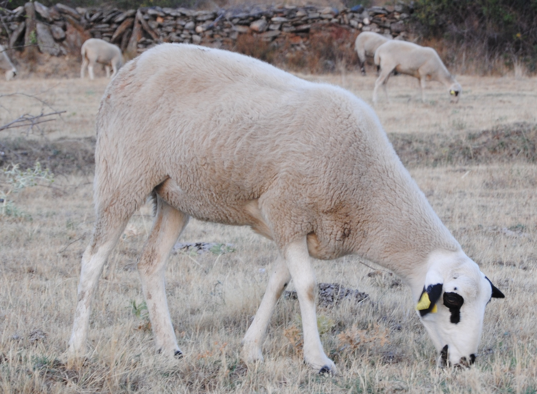 Oveja Ojalada